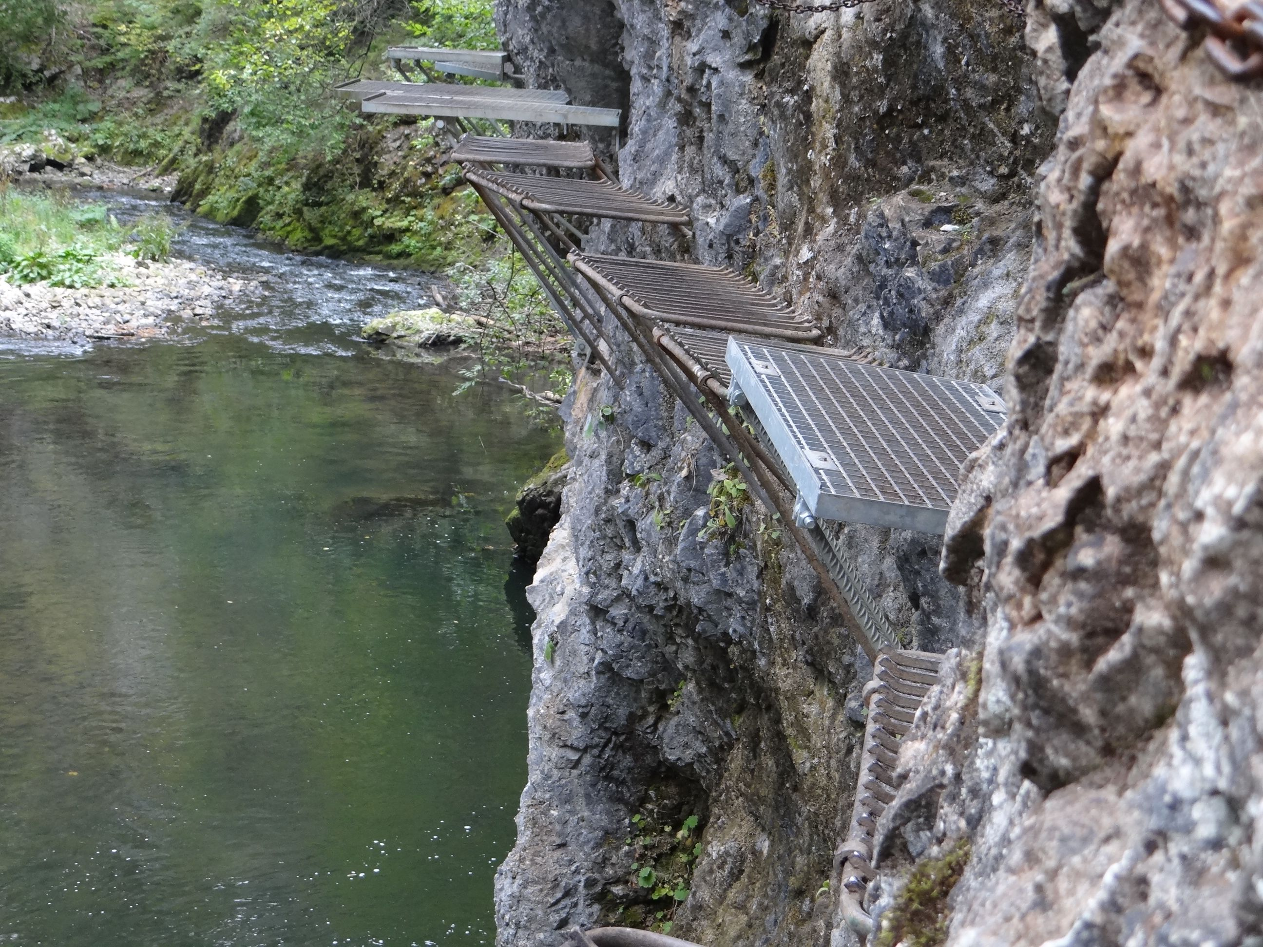 Przełom Hornadu